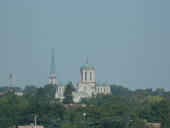 A katolikus és az ortodox templom tornya Adán, balra pedig a postatorony (Szerbia)